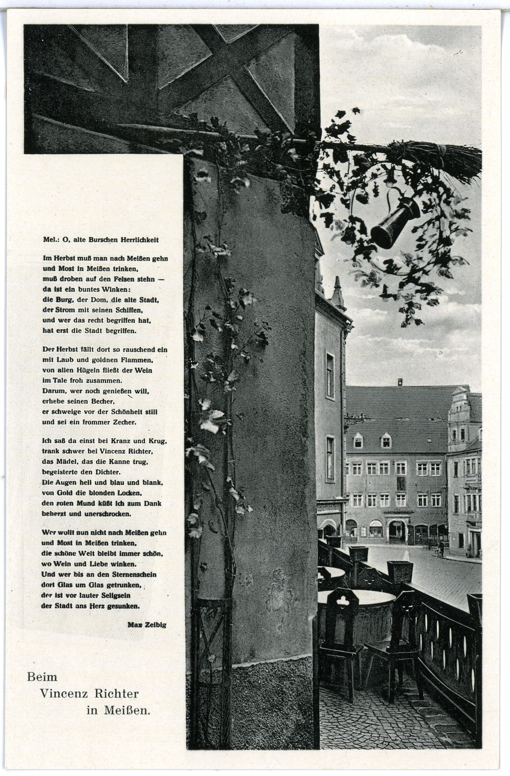 Meißen; Vincenz Richter This postcard is from publisher Brück & Sohn in Meißen ( postcard has a unique number 26456 and is available in a higher resolution at the publisher. This images was uploaded in a cooperation project between Wikipedians and the publisher.